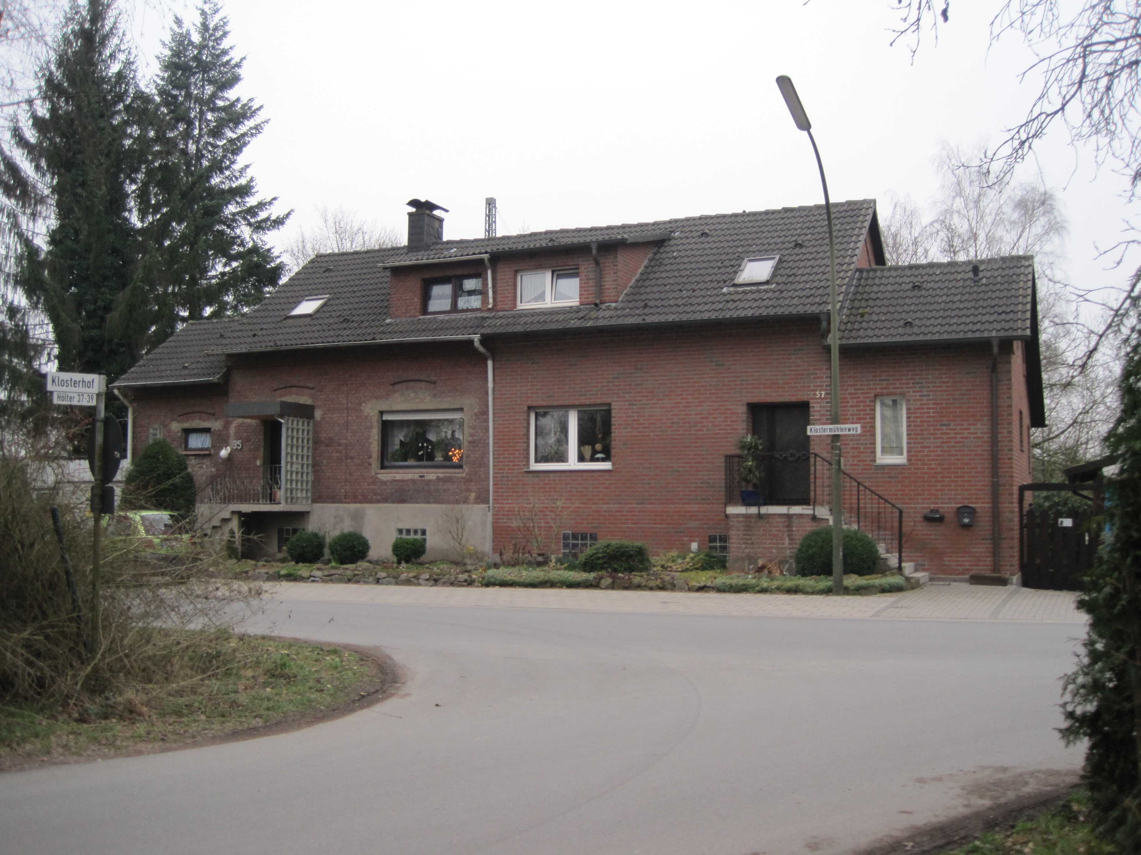 Das Foto zeigt das an den Klosterhof in Hamm-Bockum-Hövel angrenzende Anwesen.